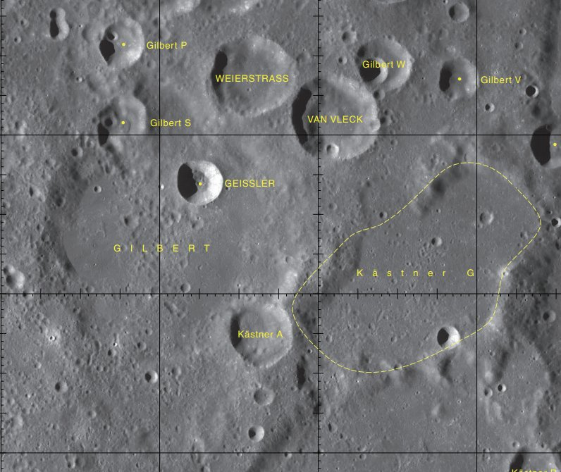 Cráter lunar Geissler. Localización. (Imagen LRO)